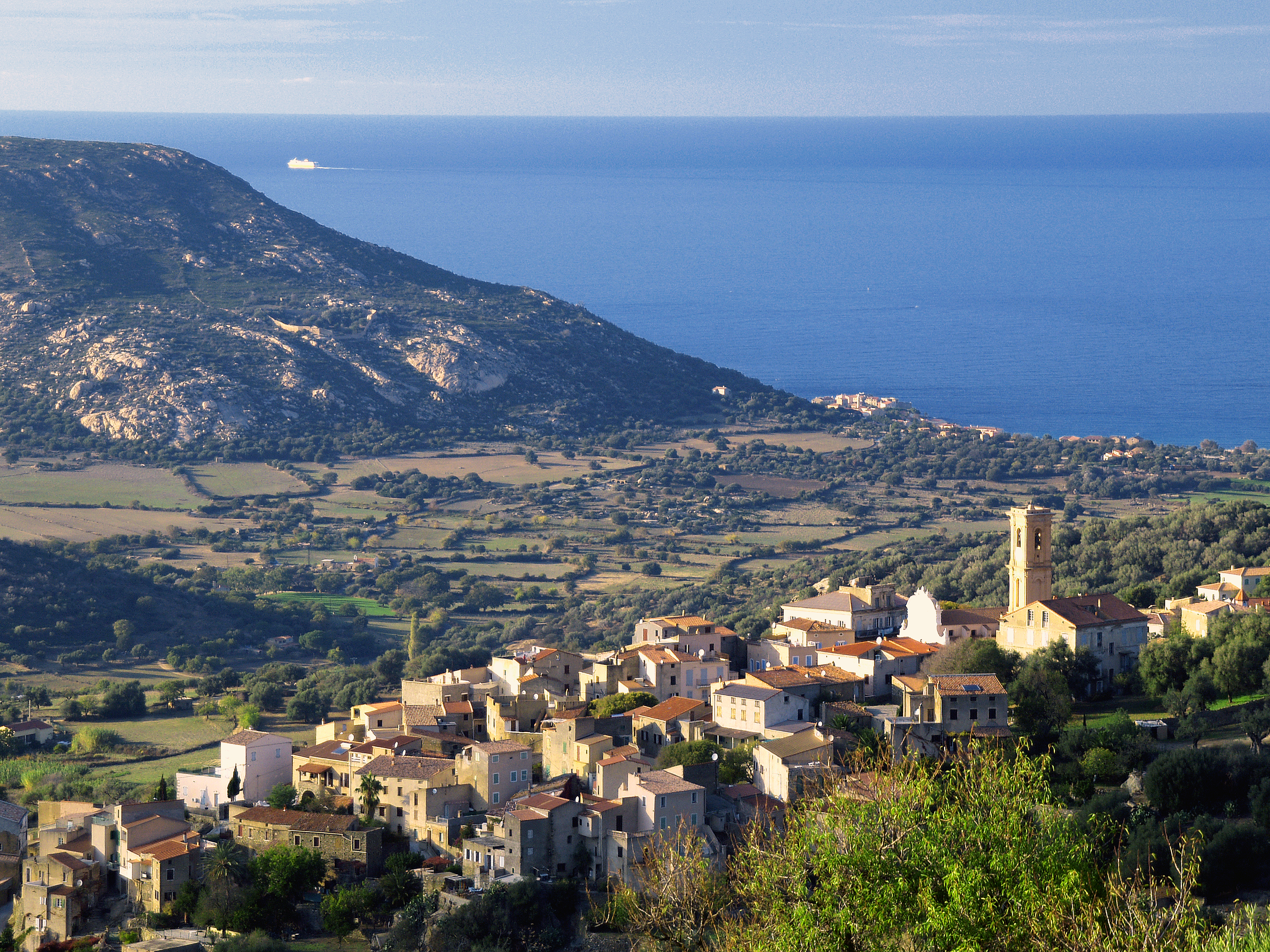 Aregno - Vue sur mer